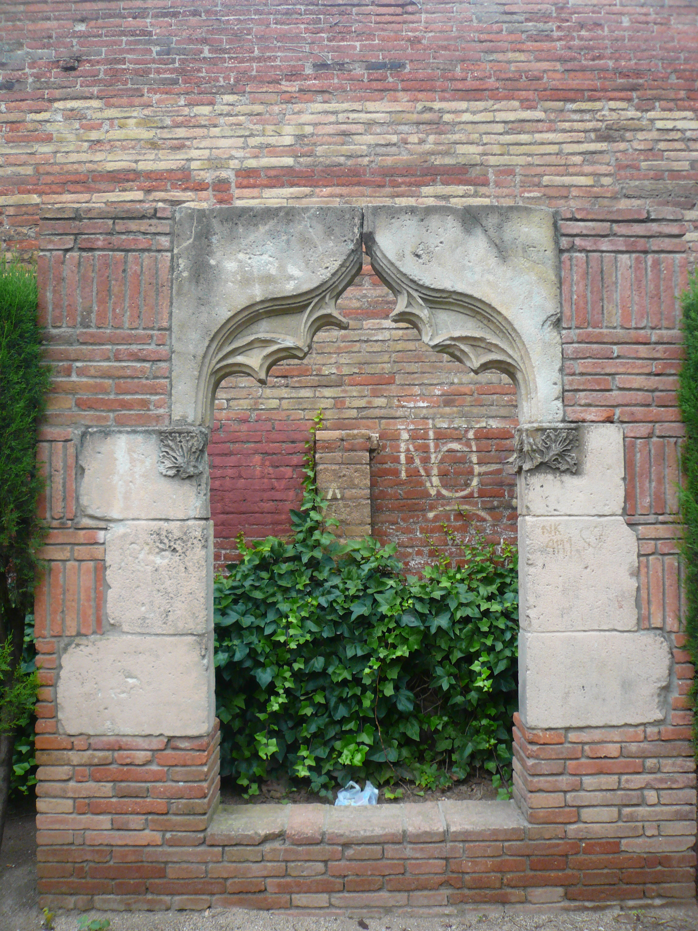 Finestres de Can Peixo. Jardí Palauet - c. Casanovas (El Prat de Llobregat). Object location41° 19′ 38.66″ N, 2° 05′ 32.94″ E